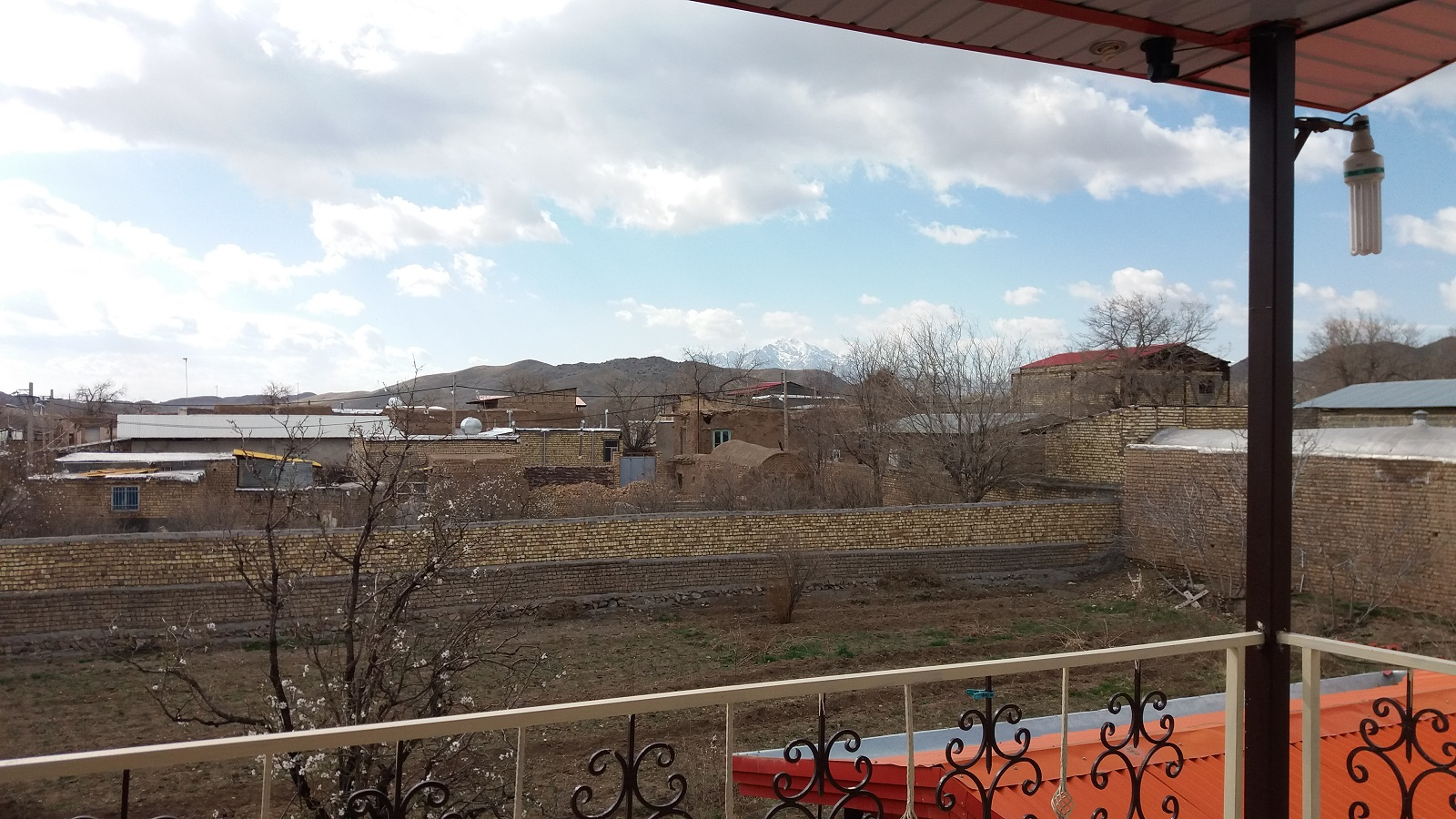 خانه های قدیمی روستا